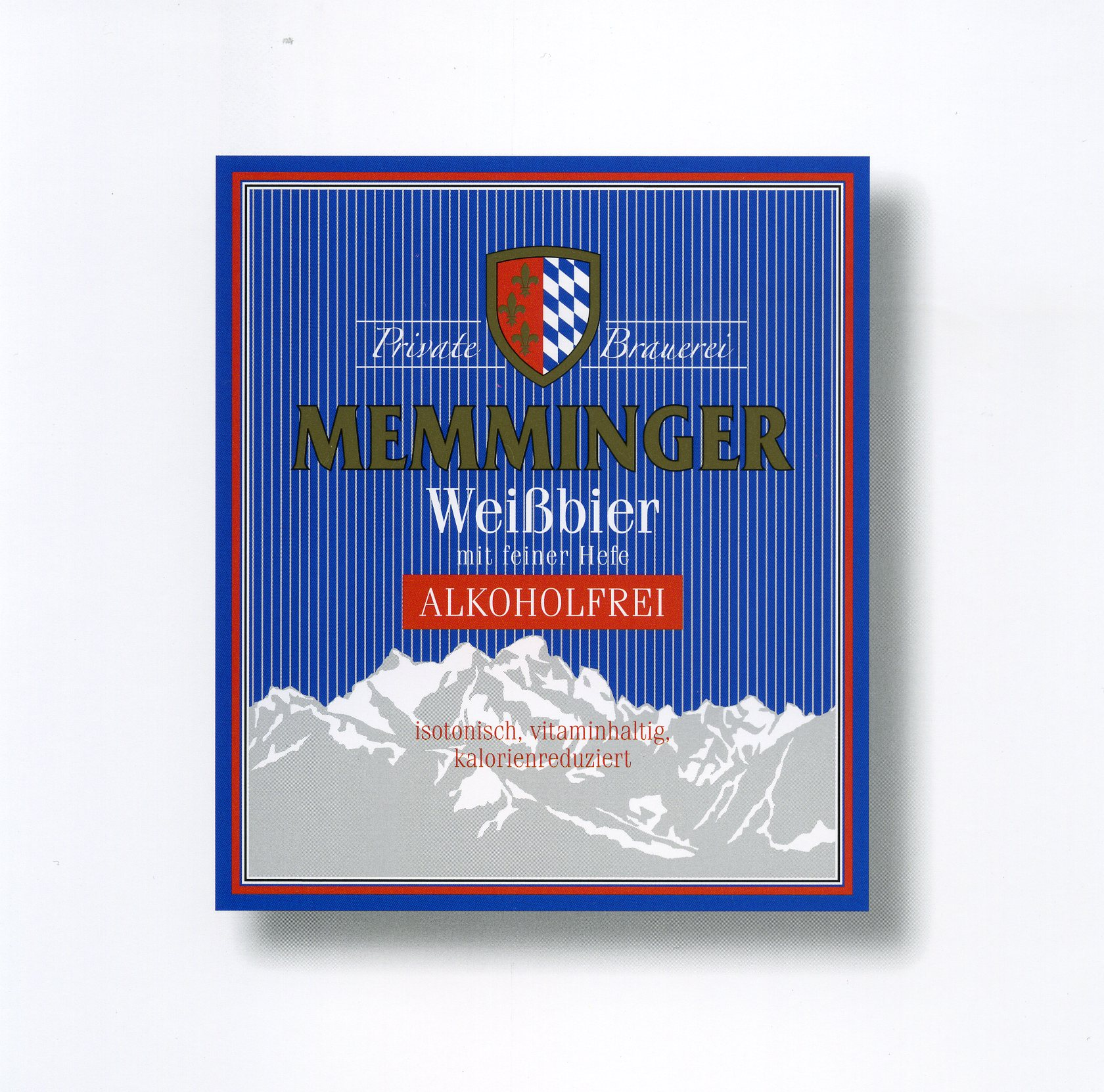 Etikett des Alkoholfreien Weizenbieres der Memminger Brauerei